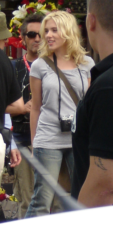 Scarlett Johansson en la Rambla de Barcelona, en el descanso de una escena de la película de Woody Allen.